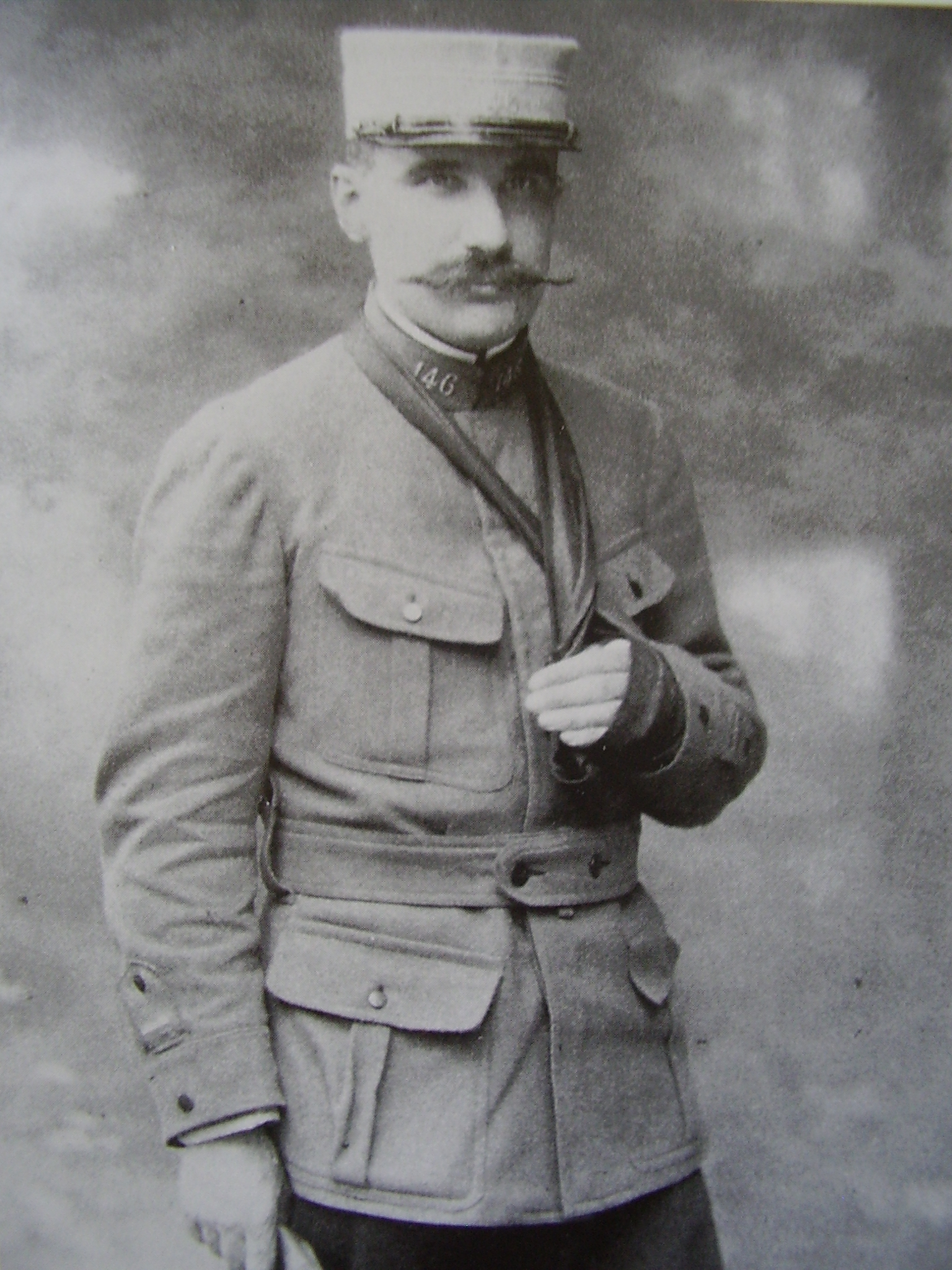 Portrait d'Augustin Cochin, historien français (1876-1916)